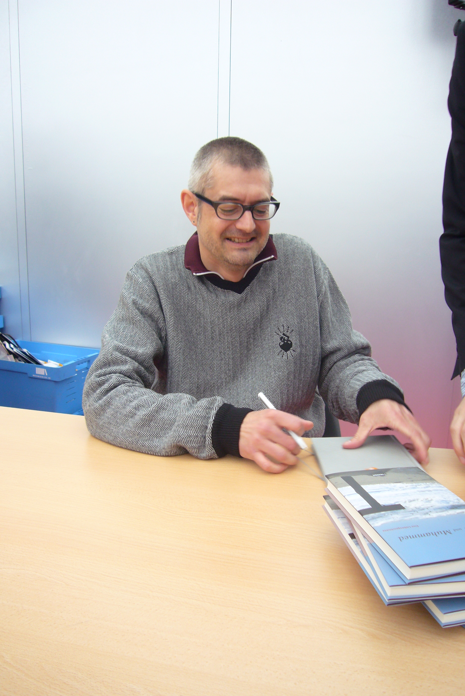 Nur für redaktionelle Nutzung / Editorial use only. Dieses Foto dürfen Sie honorarfrei nutzen, wenn Sie folgenden credit beachten: Copyright: Das blaue Sofa / Club Bertelsmann. Tim Staffel, 1965 in Kassel geboren, studierte Theaterwissenschaft in Giessen bei Andrzej Wirth. Er lebt in Berlin, schreibt Theaterstücke, short stories und Romane.